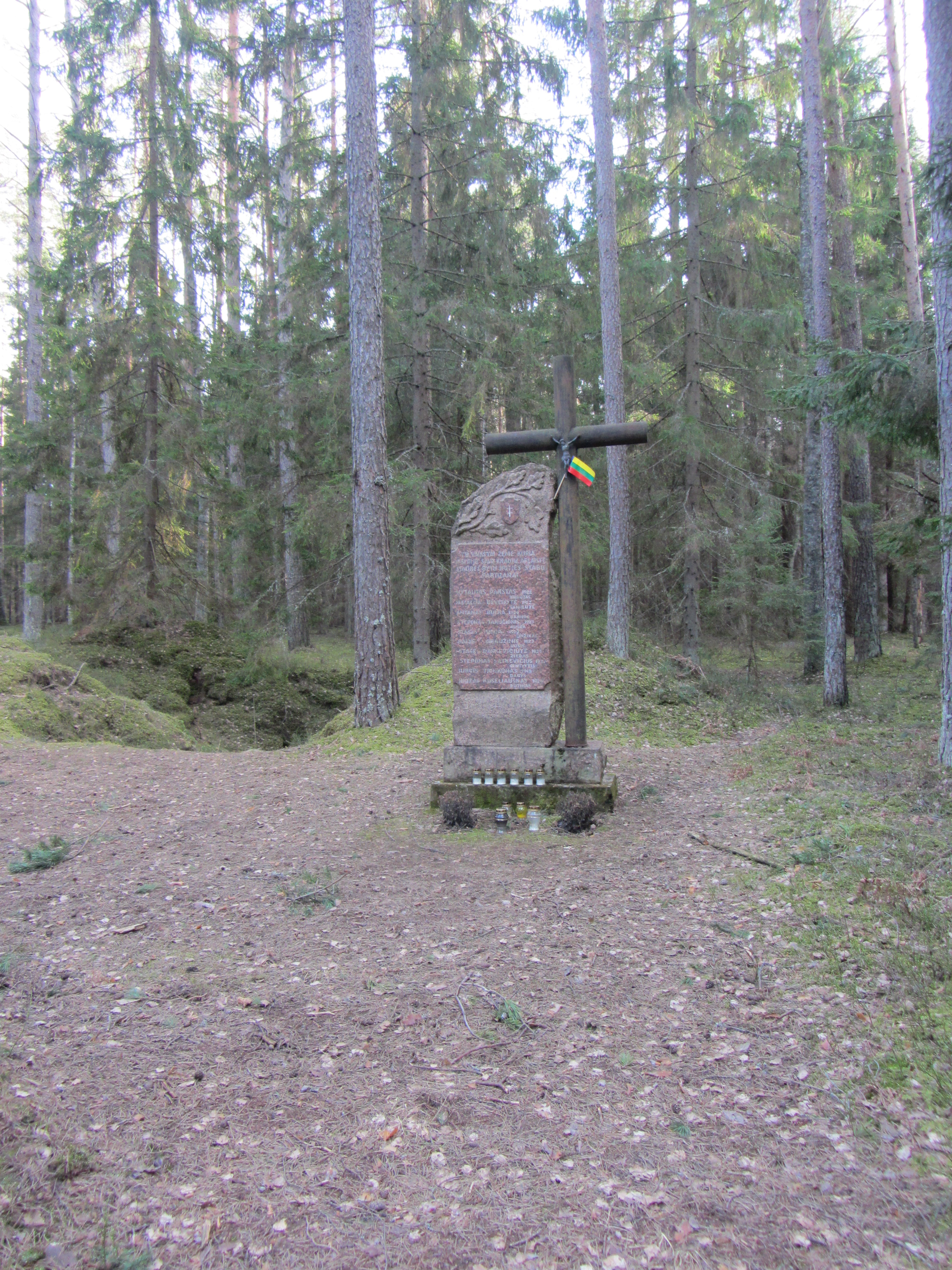 Labanoro sen., Lithuania